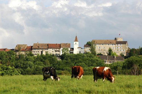 Regensberg vom Wehntal aus fotografiert (2004).